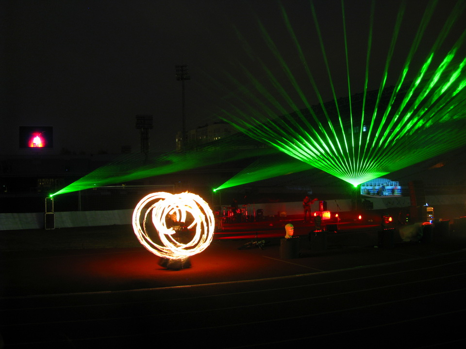 Перфоманс "Re:поэты" екатеринбургского рэпера Наума Блика, организованный на ночь музеев - 2013 на Центральном стадионе